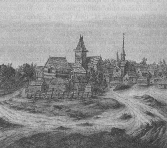 Двор дворянина. Деревня под Новгородом